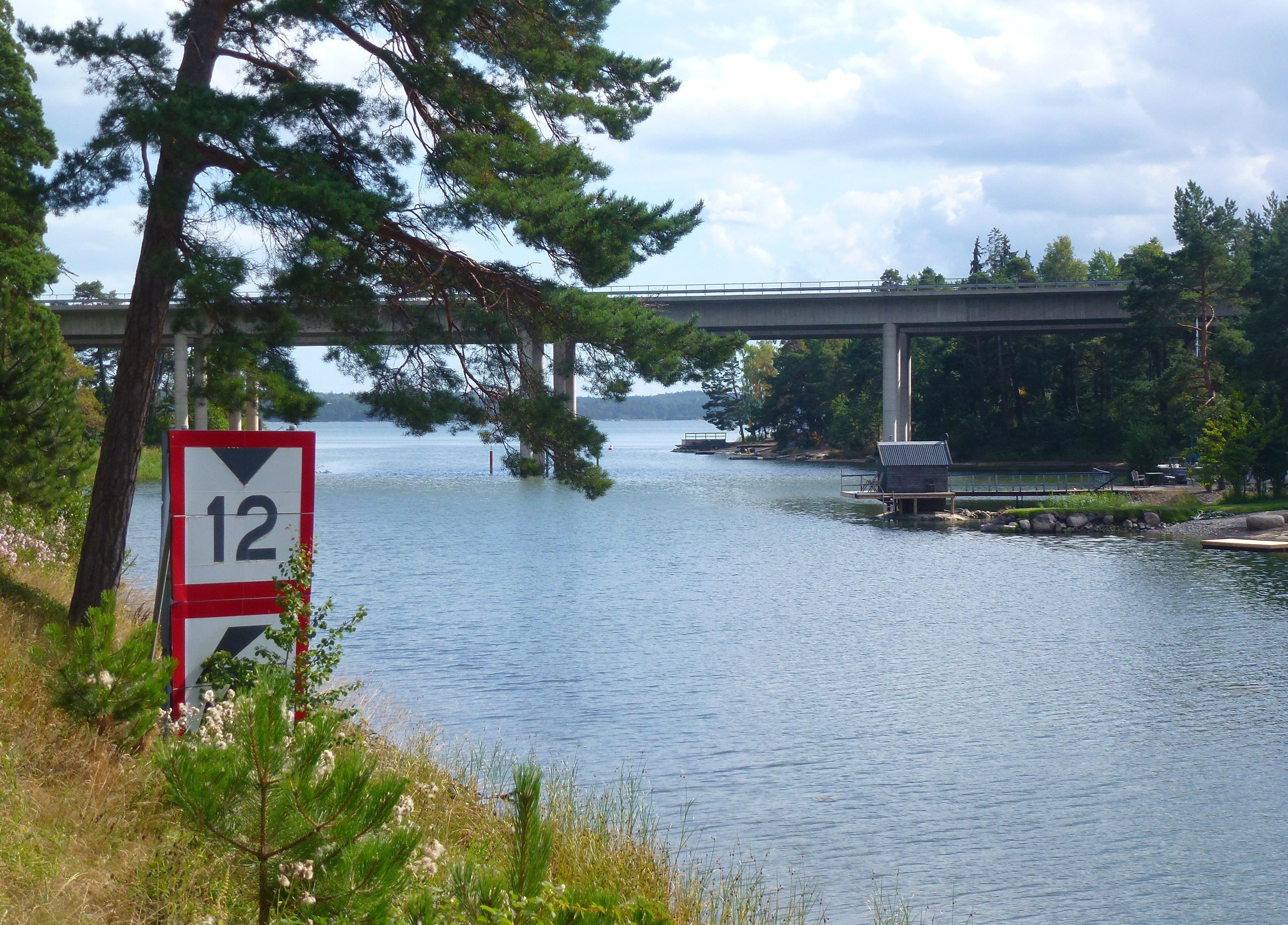 Kilviksbron